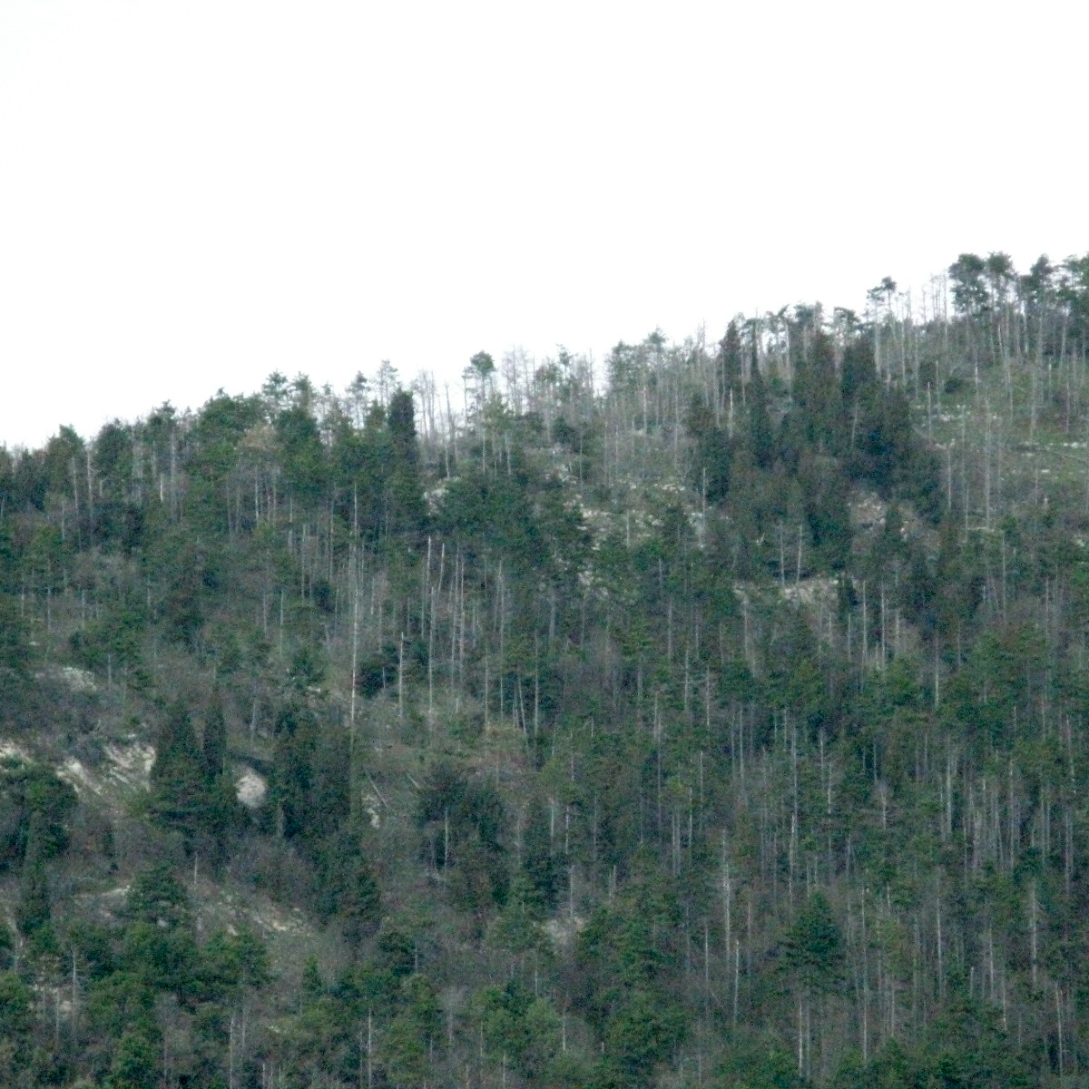 Immagini dal Monte Morello, in mezzo alla vegetazione si nota con evidenza una vasta moria di Pini Neri